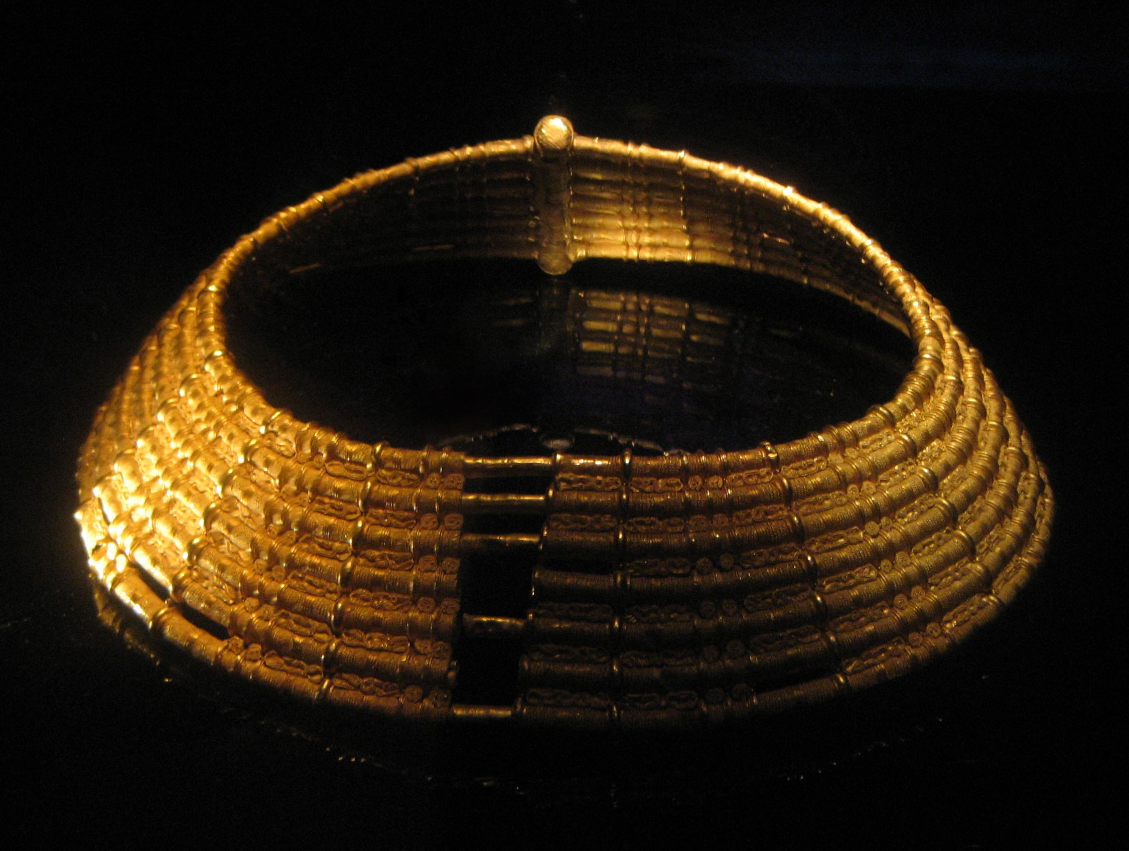 Mönekragen in the golden room in Historiska museet, Sweden.